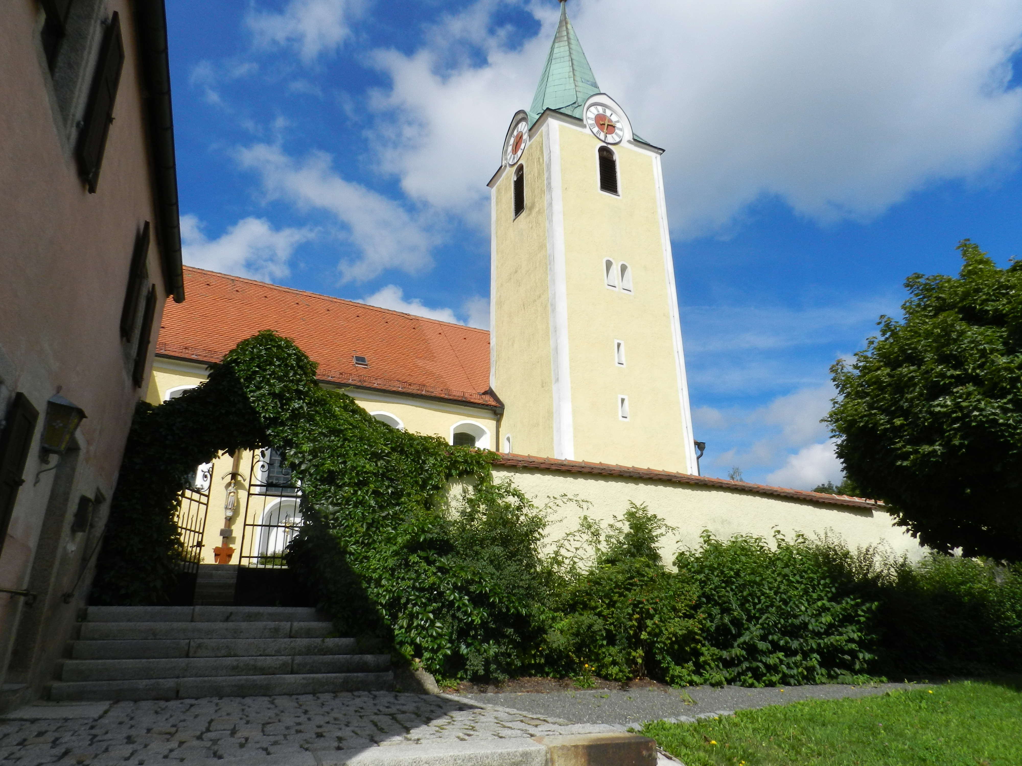 St. Ulrich in Michldorf, Gemeinde Leuchtenberg, Landkreis Neustadt an der Waldnaab, Oberpfalz, Bayern (2011)